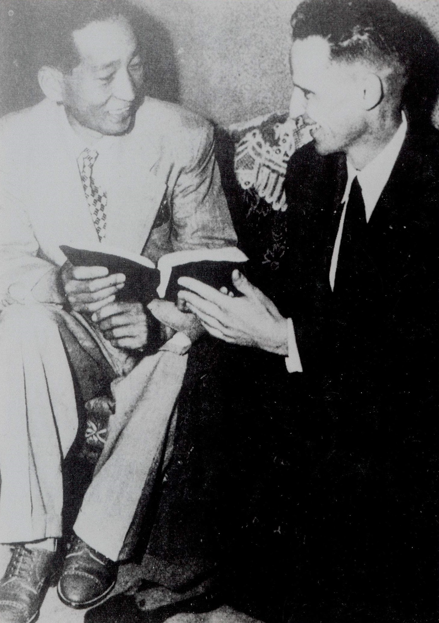 淵田美津雄とジェイコブ・デシェーザーの伝道旅行